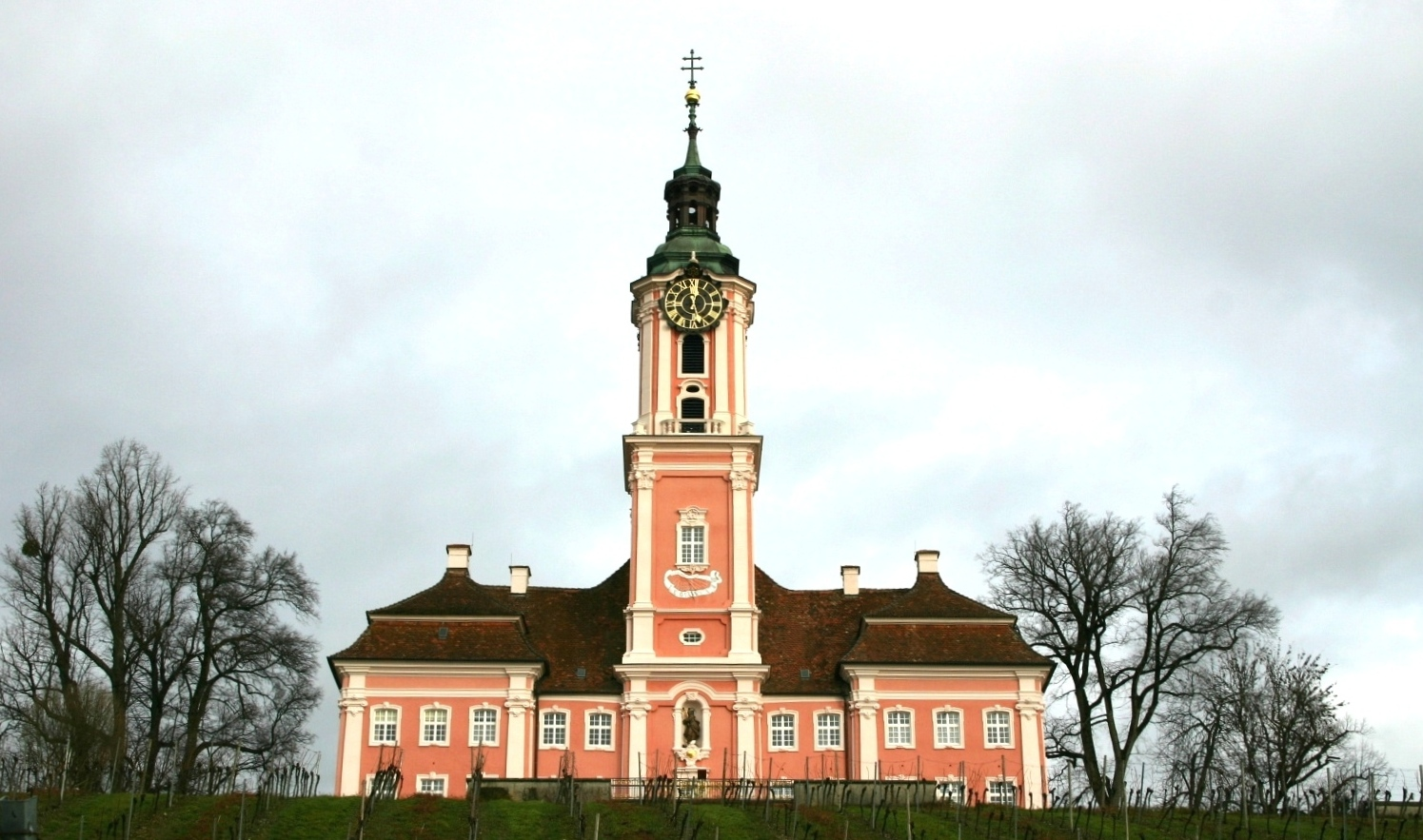 Basilika vu Birnau Quell: eege Photo Les Meloures